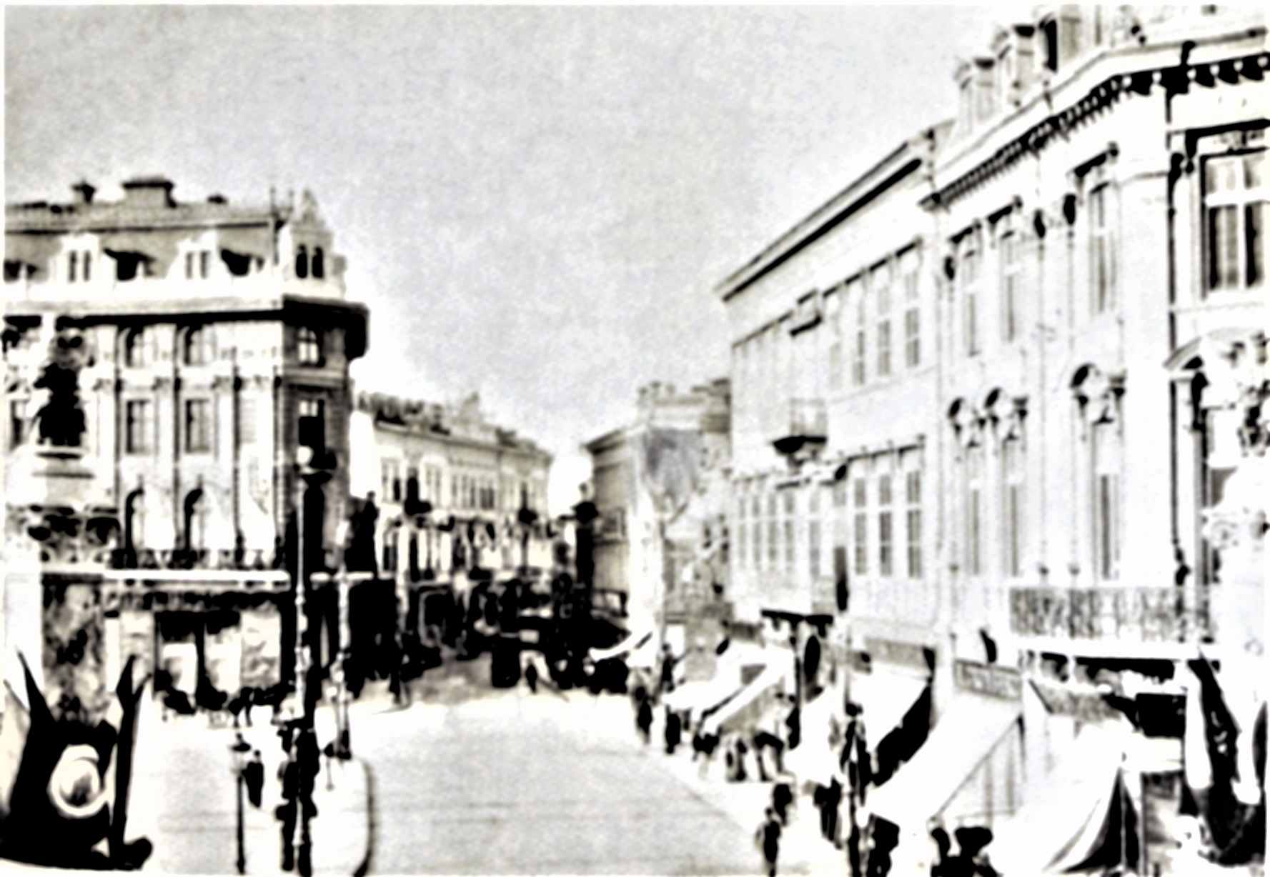 Calea Victoriei in Bukarest um 1895